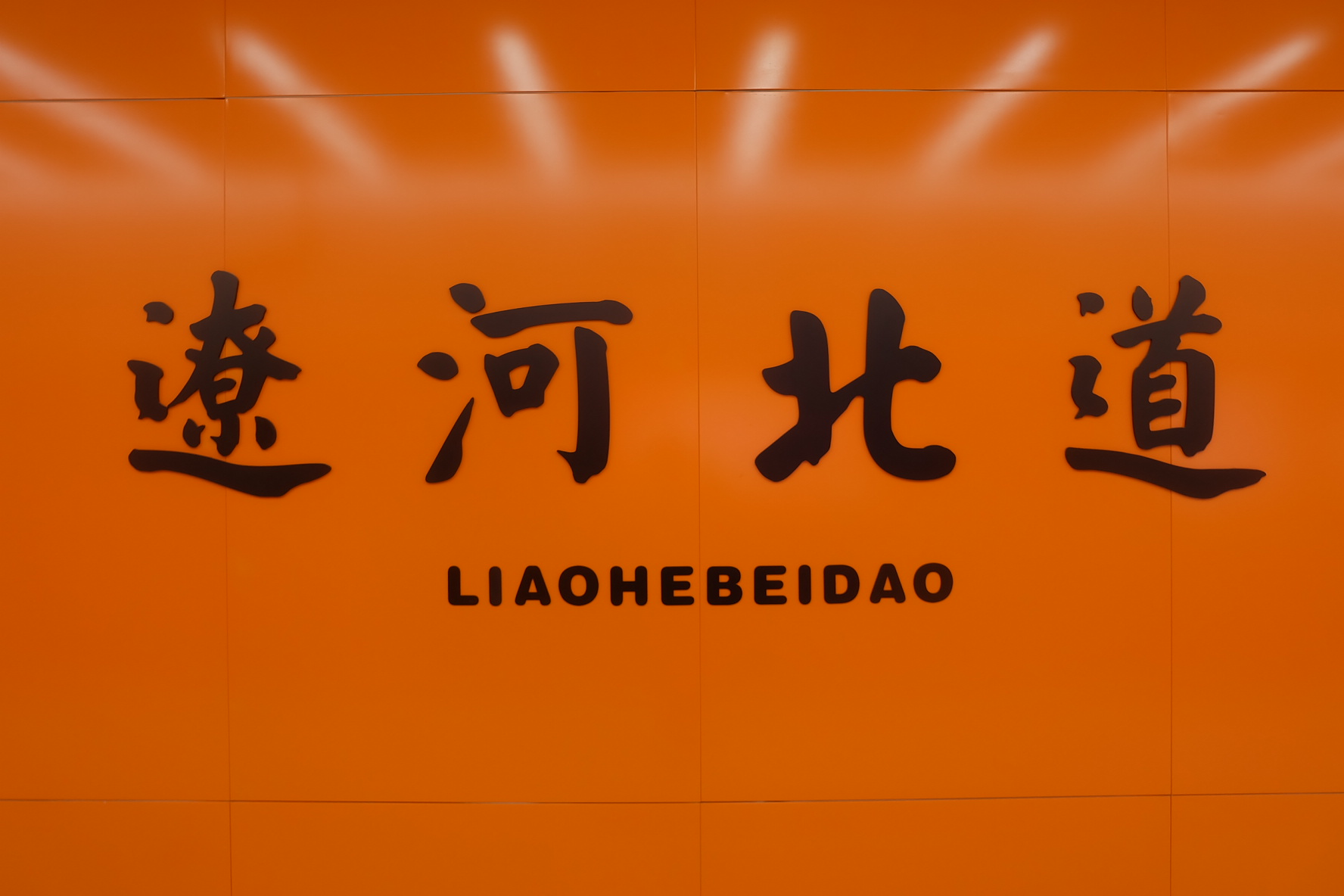 辽河北道站站名大字壁，位于辽河北道站站台层